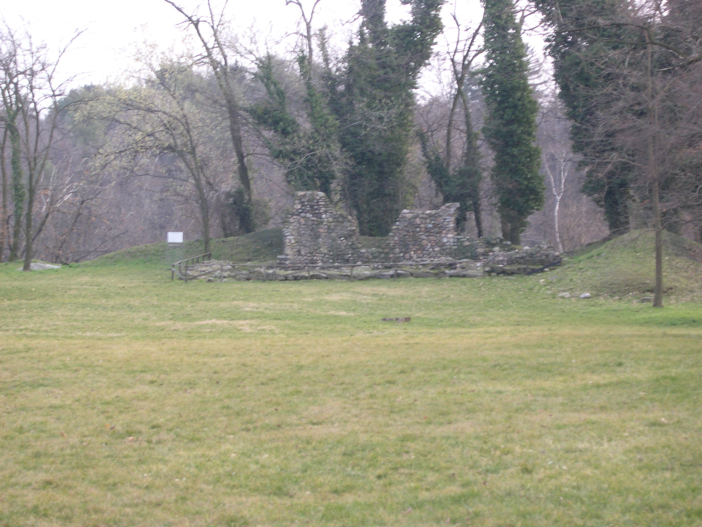 Resti della torre meridionale del Castrum di Castelseprio